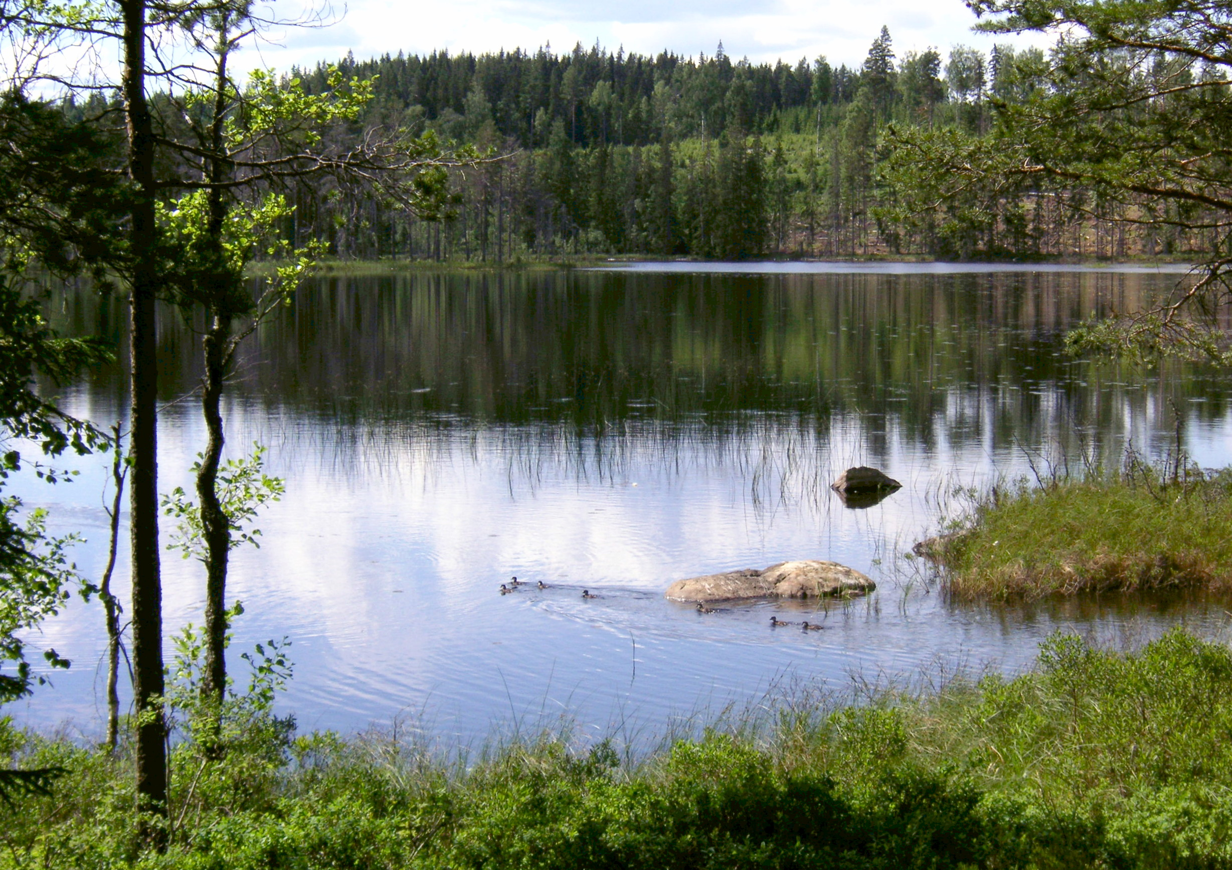 Trehörningen (Norrbärke socken, Dalarna, 668341-147024)